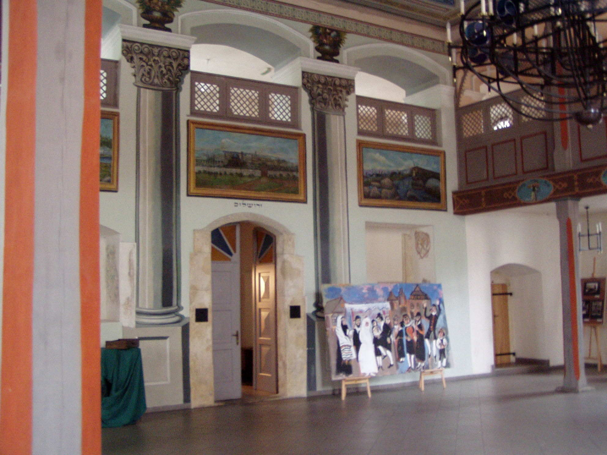 Synagoga Kupa w Krakowie Author: Wikipedysta:Birczanin